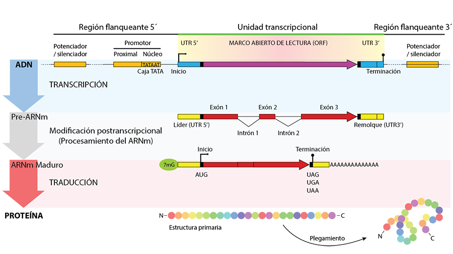 Modificaciones a partir del archivo de Thomas Shafee. URL